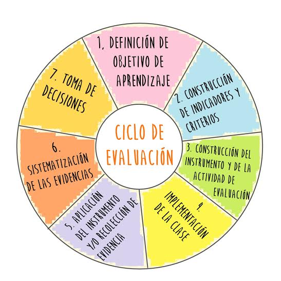 Ciclo de evaluación para una práctica efectiva del proceso enseñanza-aprendizaje.